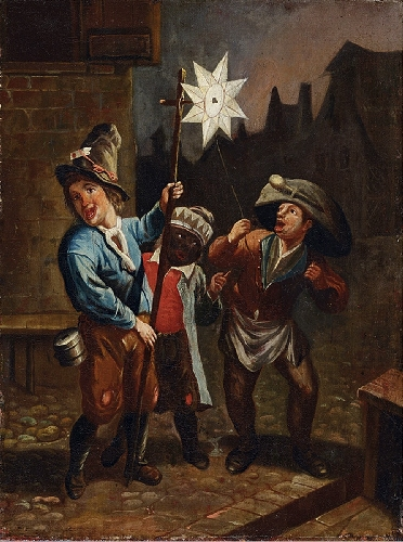 Januar. Aus einer Reihe von 12 Monatsbildern nach Jan Miense Molenaer, deutsch, spätes 17. Jahrhundert. Öl auf Holz. 32,6 x 24,5 cm.